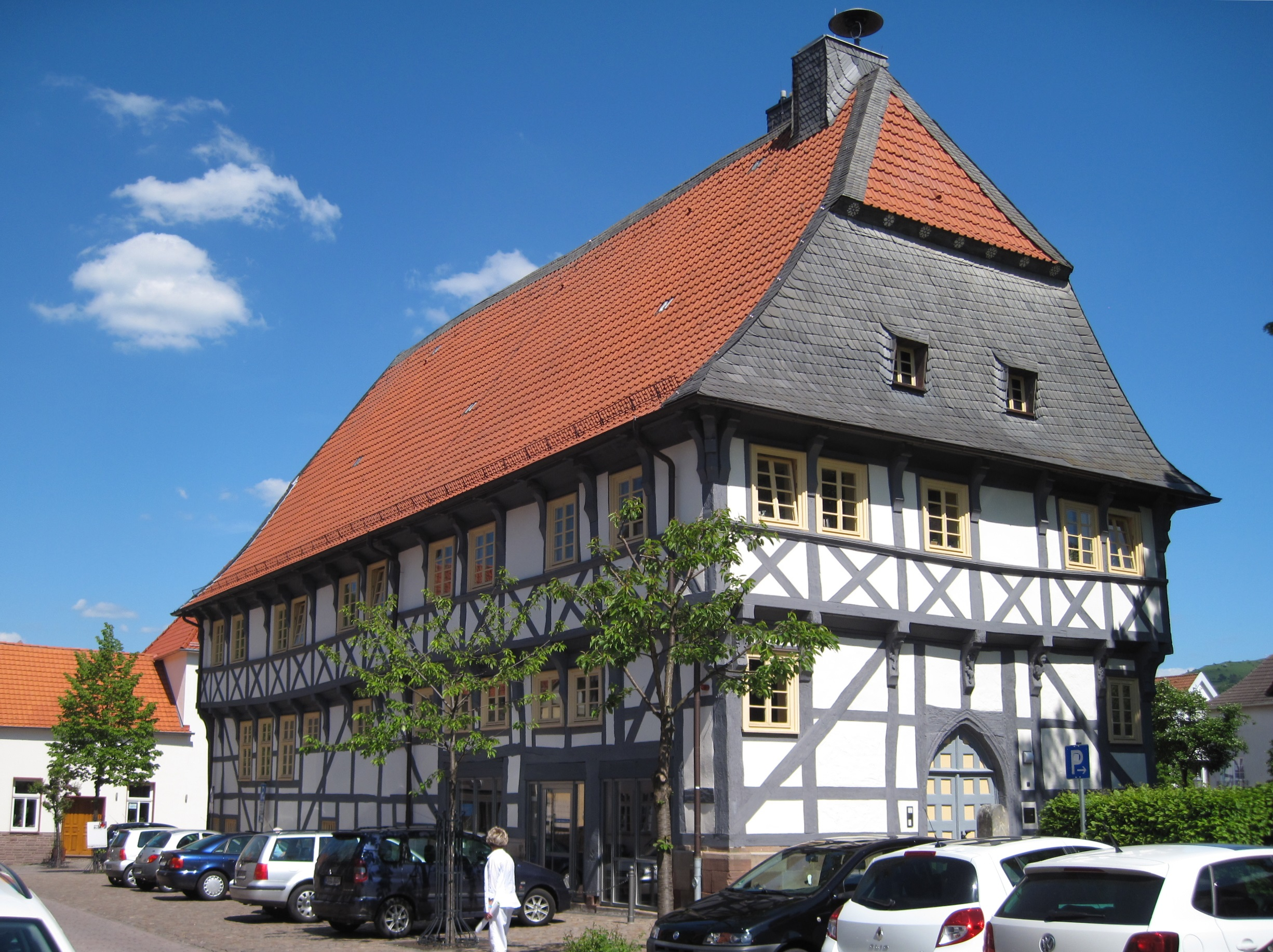 Denkmalgeschütztes Rathaus in Zierenberg. Gotisierender Fachwerkbau. Ältestes erhaltenes Fachwerkhaus Hessens. Erbaut 1450 durch Henrich Brant.